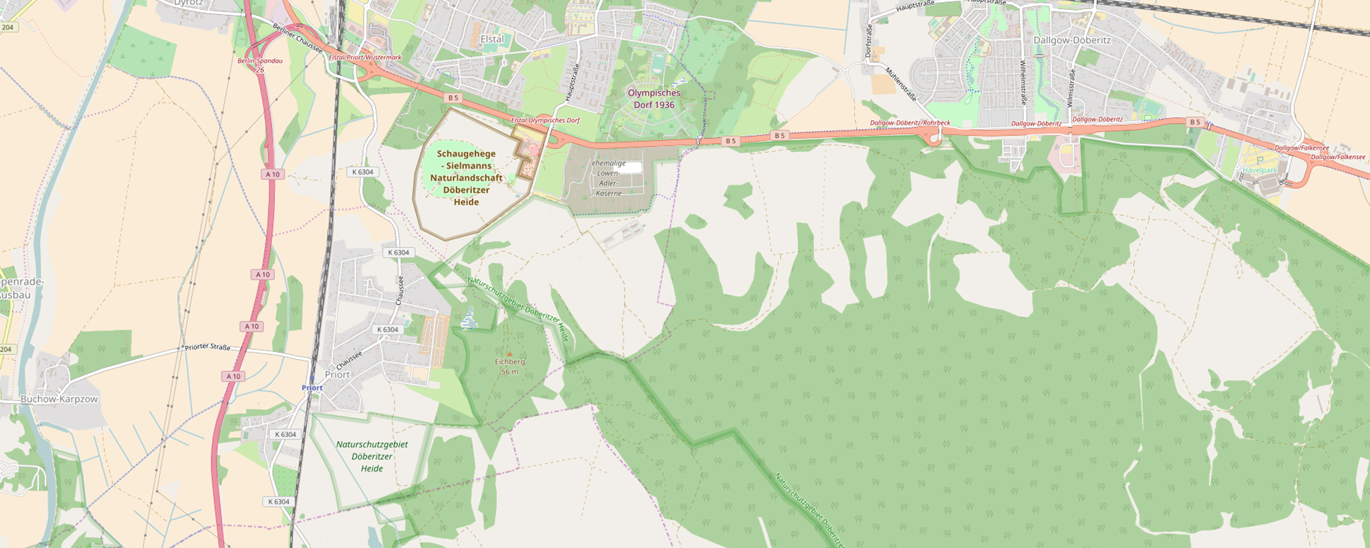 OpenStreetMap Kartenausschnitt Dallgow-Döberitz und Döberitzer Heide. Das Gelände Schaugehege - Sielmanns Naturlandschaft Döberitzer Heide wurde zwischen 1910 und 1960 als Flugplatz Döberitz genutzt. Diese topographische Karte zeigt den gleichen Kartenausschnitt.